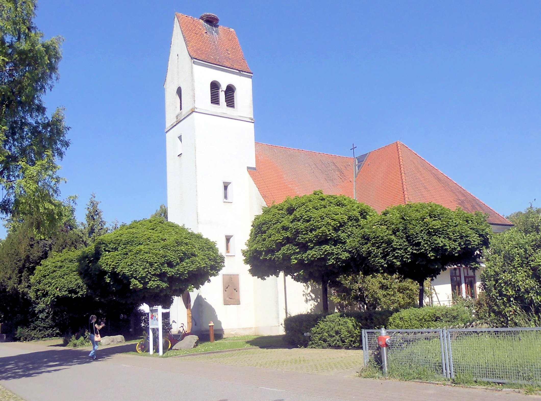 Protestantische Erlöserkirche in Neuenburg am Rhein